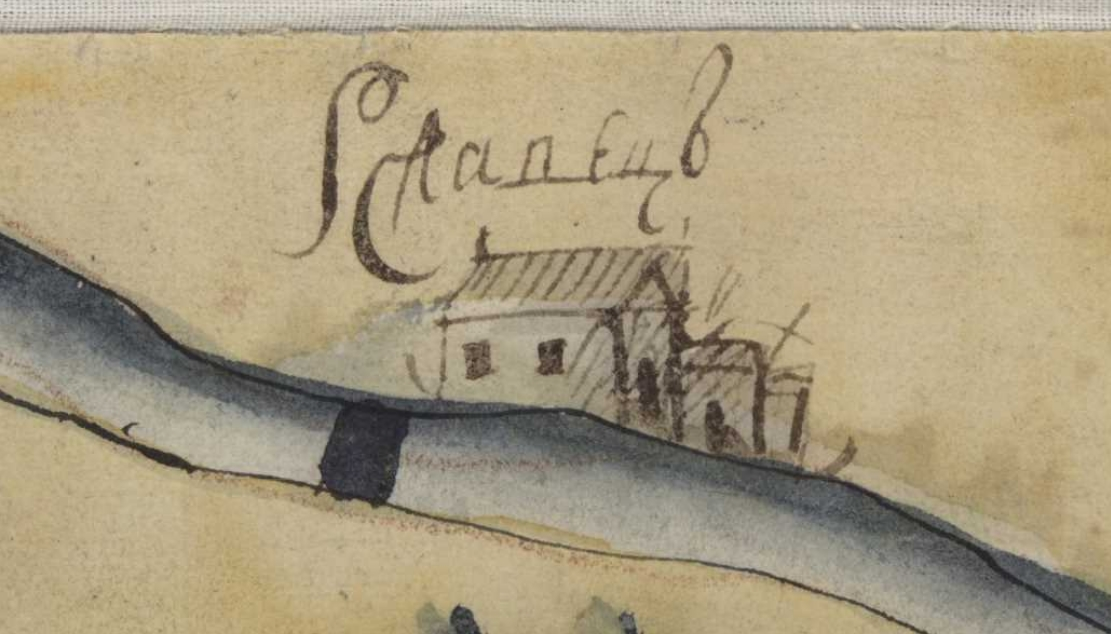 Фрагмент карти Київської губернії. XVIII століття. РГАДА, ф. 192, оп. 1, Киевская губ., № 5.